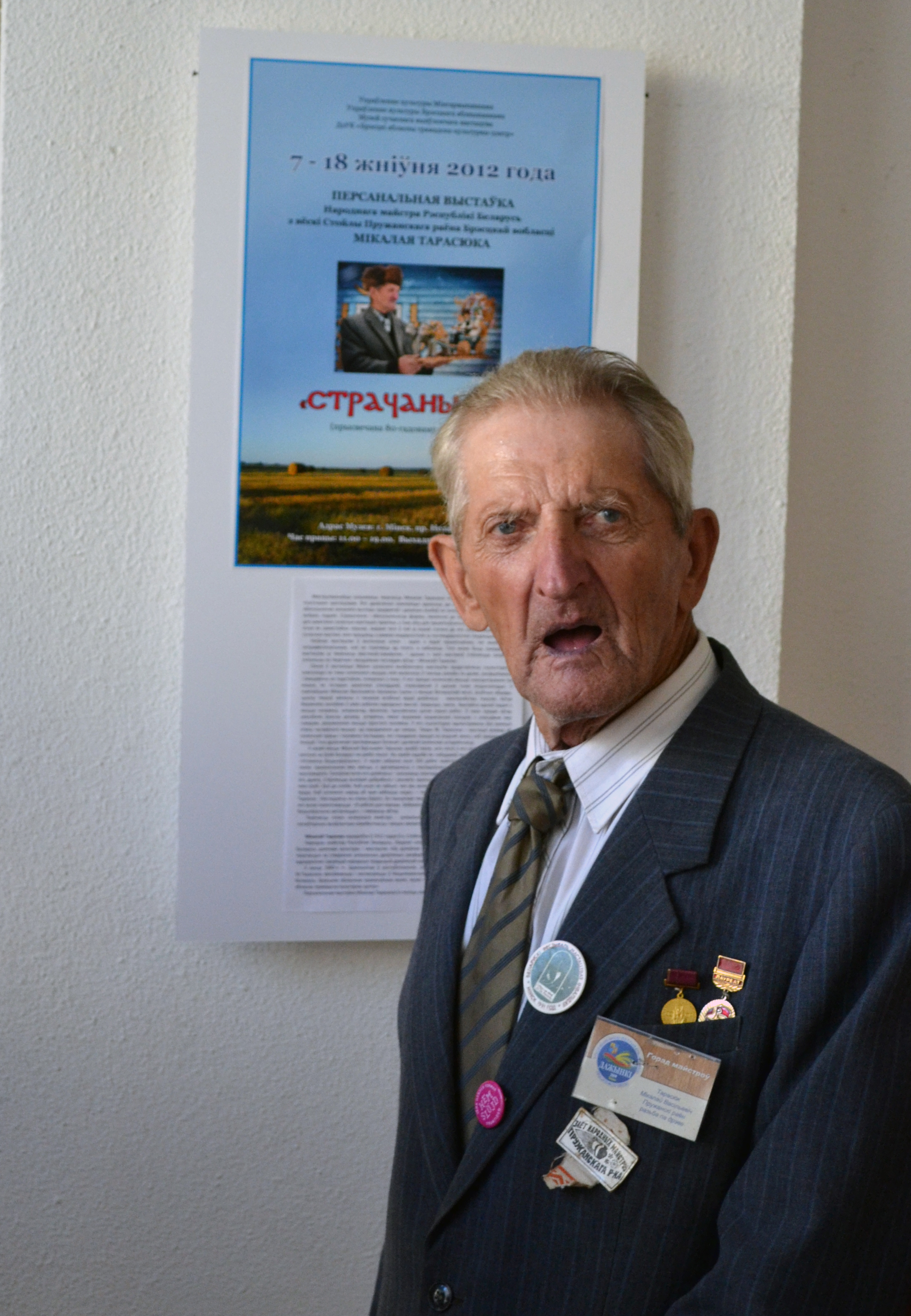 Беларуская (тарашкевіца): Мікалай Тарасюк на адкрыцьці ўласнай выставы «Страчаны рай» у Музэі сучаснага выяўленчага мастацтва